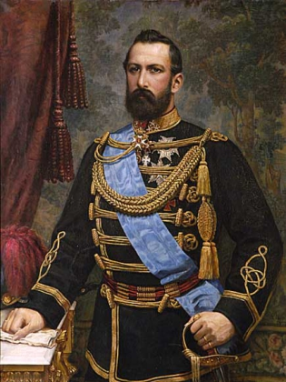 Portrait de Charles XV de Suède et de Norvège